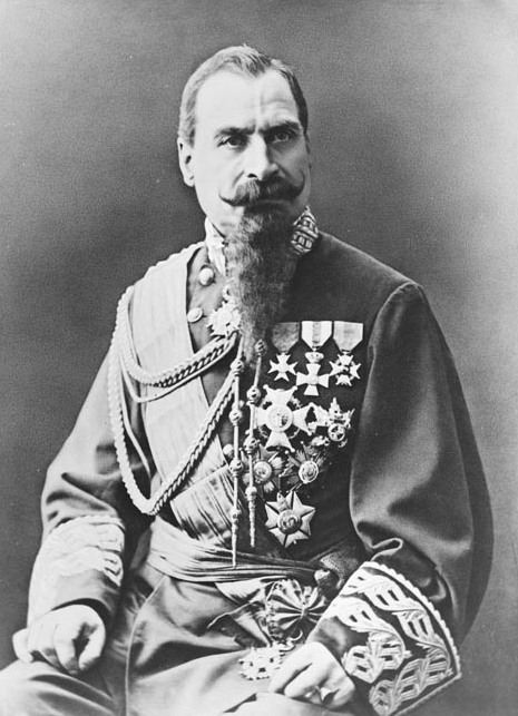 Reproducció d'un retrat fotogràfic de mig cos del general carlista Rafael Tristany i Parera. L'autor de la fotografia original no ha estat identificat.